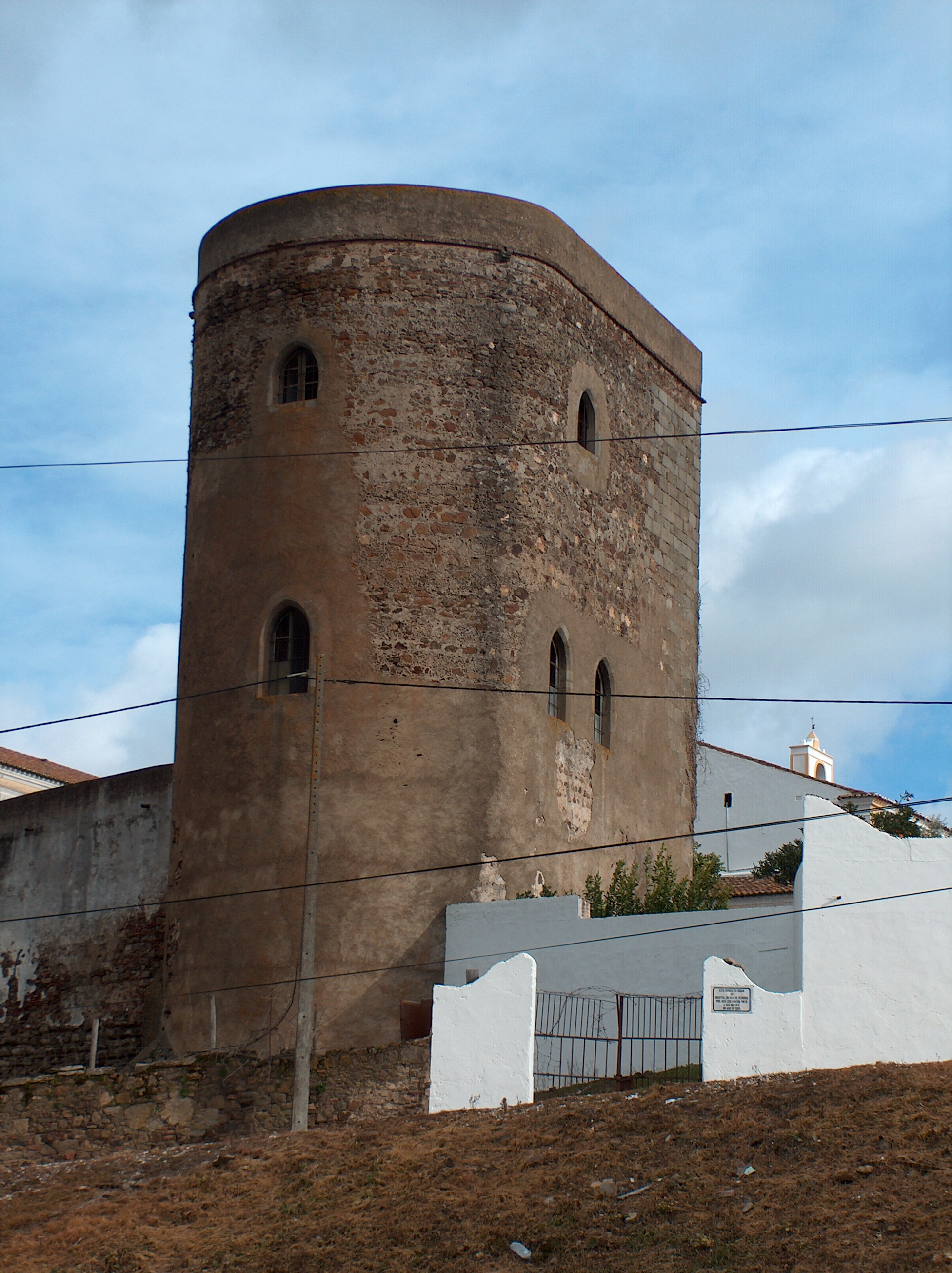 Prédio militar n.º 1, constituído por restos de muralha e torre de menagem do Castelo de Redondo